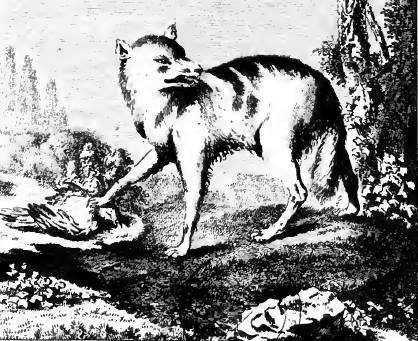 1770-ci ildə Salyanda olan Rusiya Elmlər Akademiyasında işləyən alman alimi Samuel Qotlib Gmelinin çəkdiyi çaqqal rəsmi